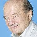 Pentti Alanko